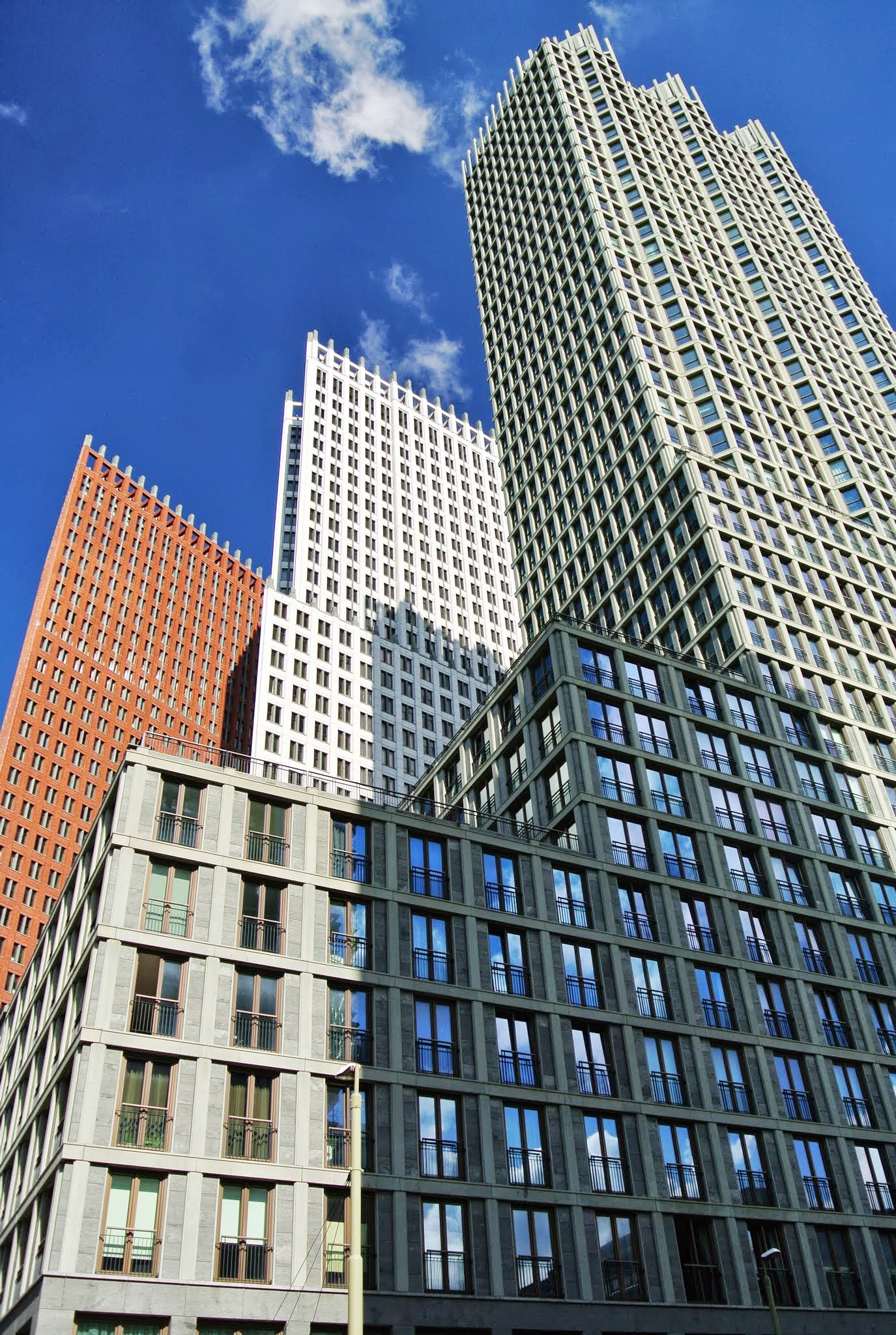 Uilebomen, Den Haag, Netherlands